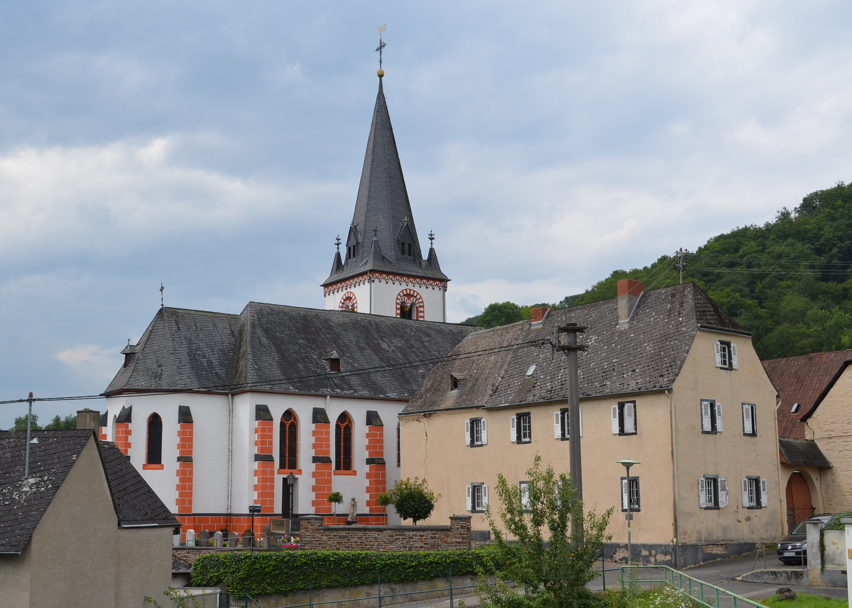 Löf, Sint-Luciakerk